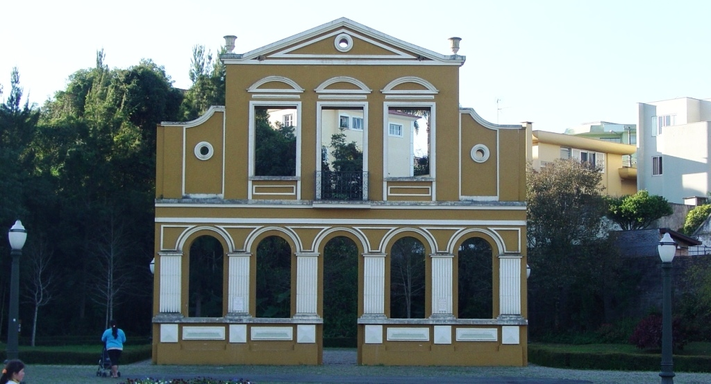 Foto da entrada do Bosque Alemão - Curitiba/PR